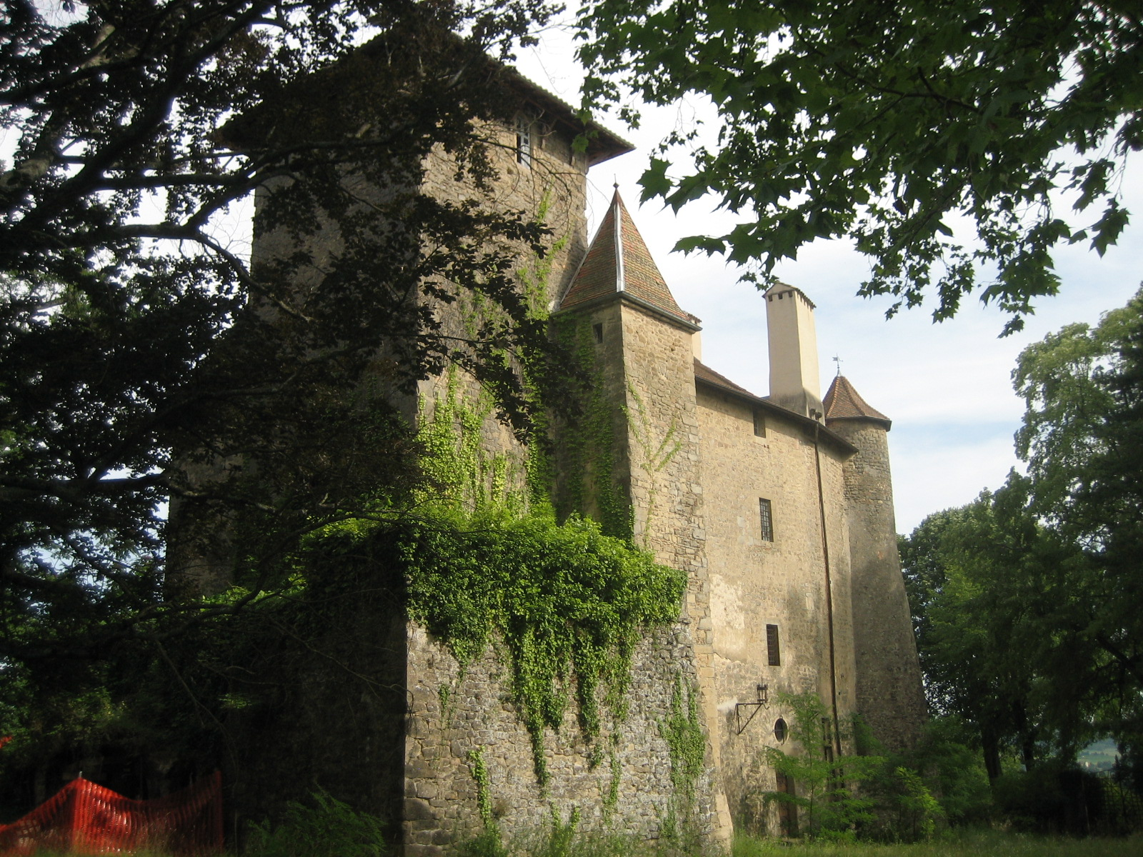 Château féodal de Charmes-sur-l'Herbasse (Drôme)